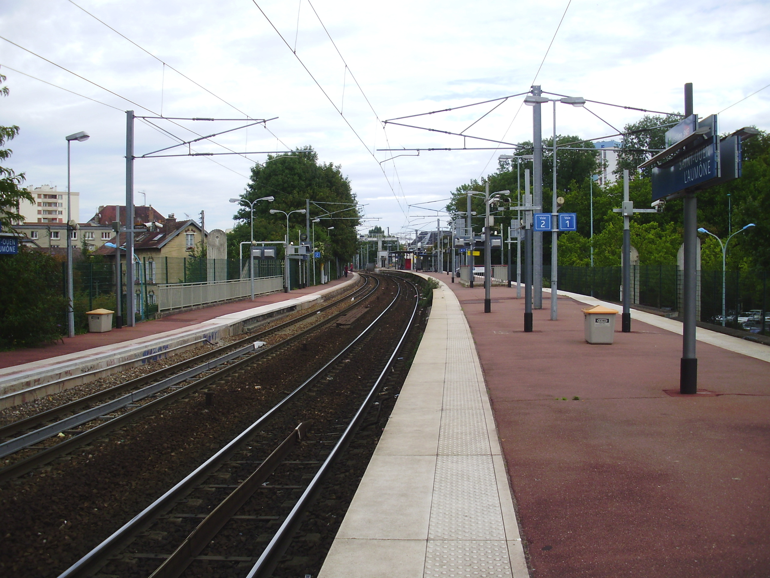 Gare de Saint-Ouen-l'Aumône, Val-d'Oise, France : vue d'ensemble des quais et des voies en regardant vers Paris depuis l'extrémité ouest du quai central